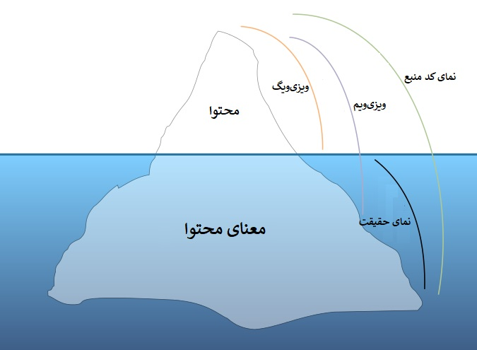 دیدگاه های مختلف ویرایش محتوا: ویزی‌ویگ، ویزی‌ویم، کد منبع، حقیقت.